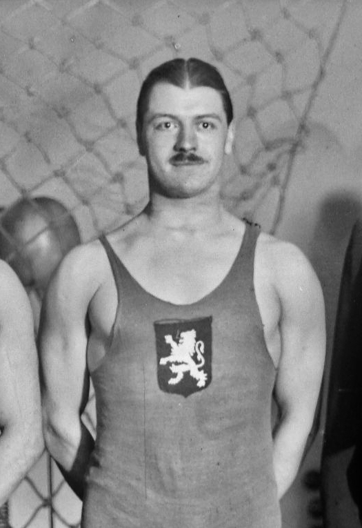 30-12-22, match France-Belgique, équipe de water-polo belge : Paul Gailly : [photographie de presse] / [Agence Rol]